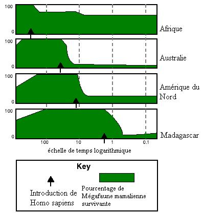 Auteur:User:Vincnet Description du % de megafaune dans divers continents au cours du quaternaire reprise depuis : Image:Extinctions Africa Austrailia NAmerica Madagascar.gif wikipedia en,elle-même libre de droits et inspirée de "march of man" (after Martin,1989) Licensing catégorie:humaincatégorie:animal